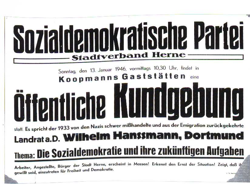 Wilhelm Hansmann spricht in Koopmanns Gaststätten Herne 1946